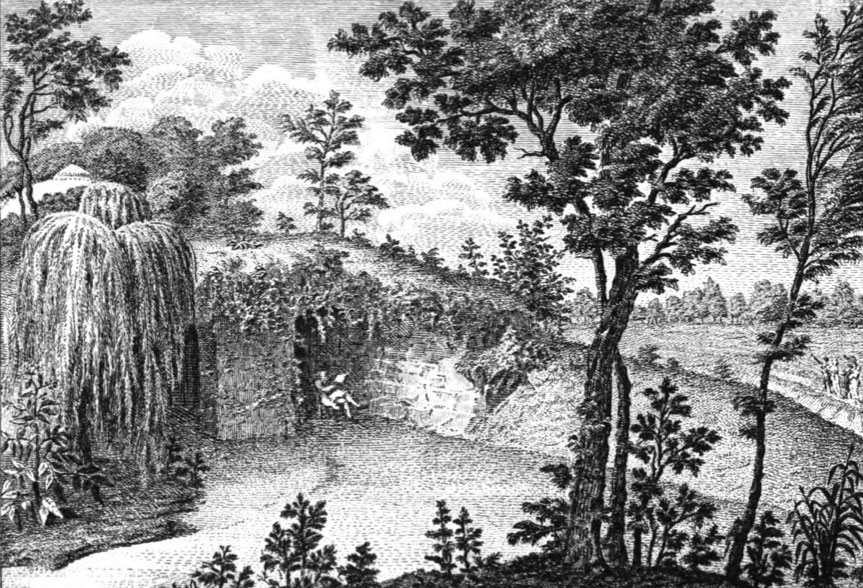 La grotta presente al tempo nel parco di Villa Ghirlanda Silva, a Cinisello.